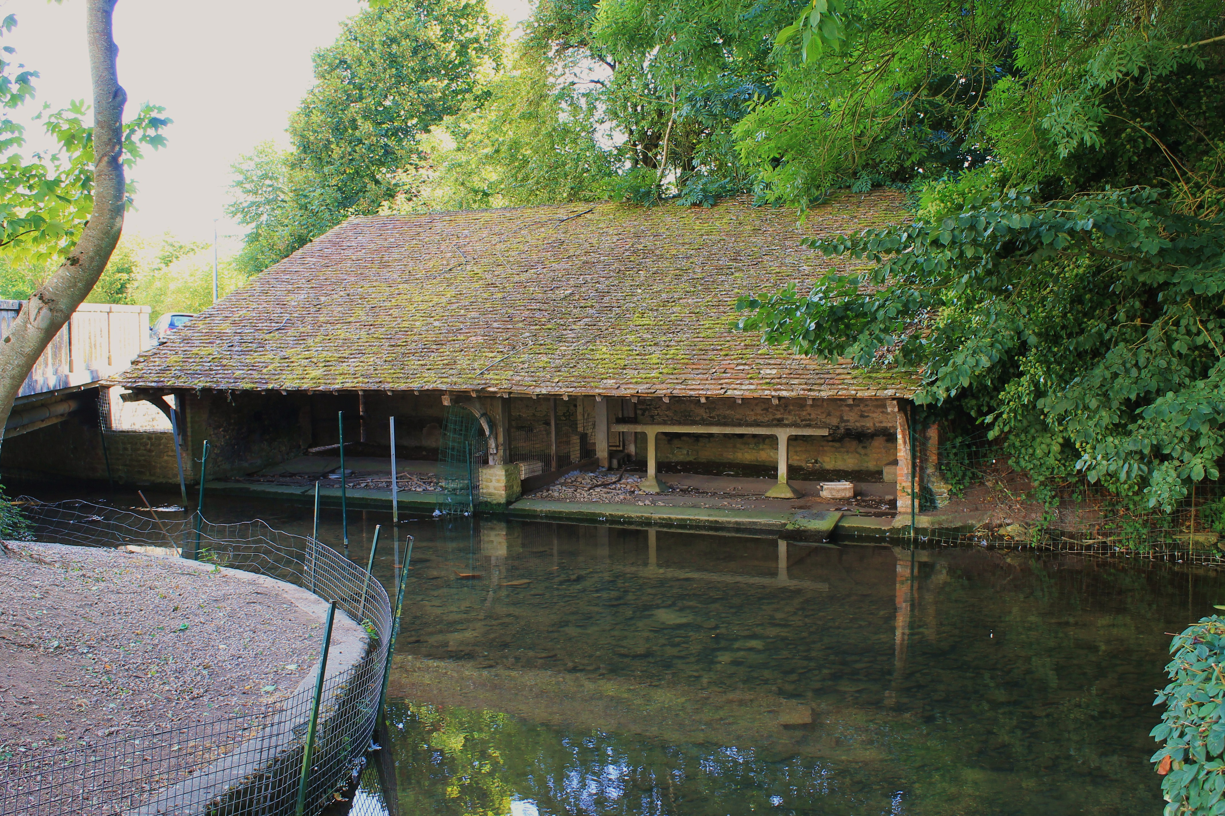 Lavoir sur la Muance à Moult (Calvados)